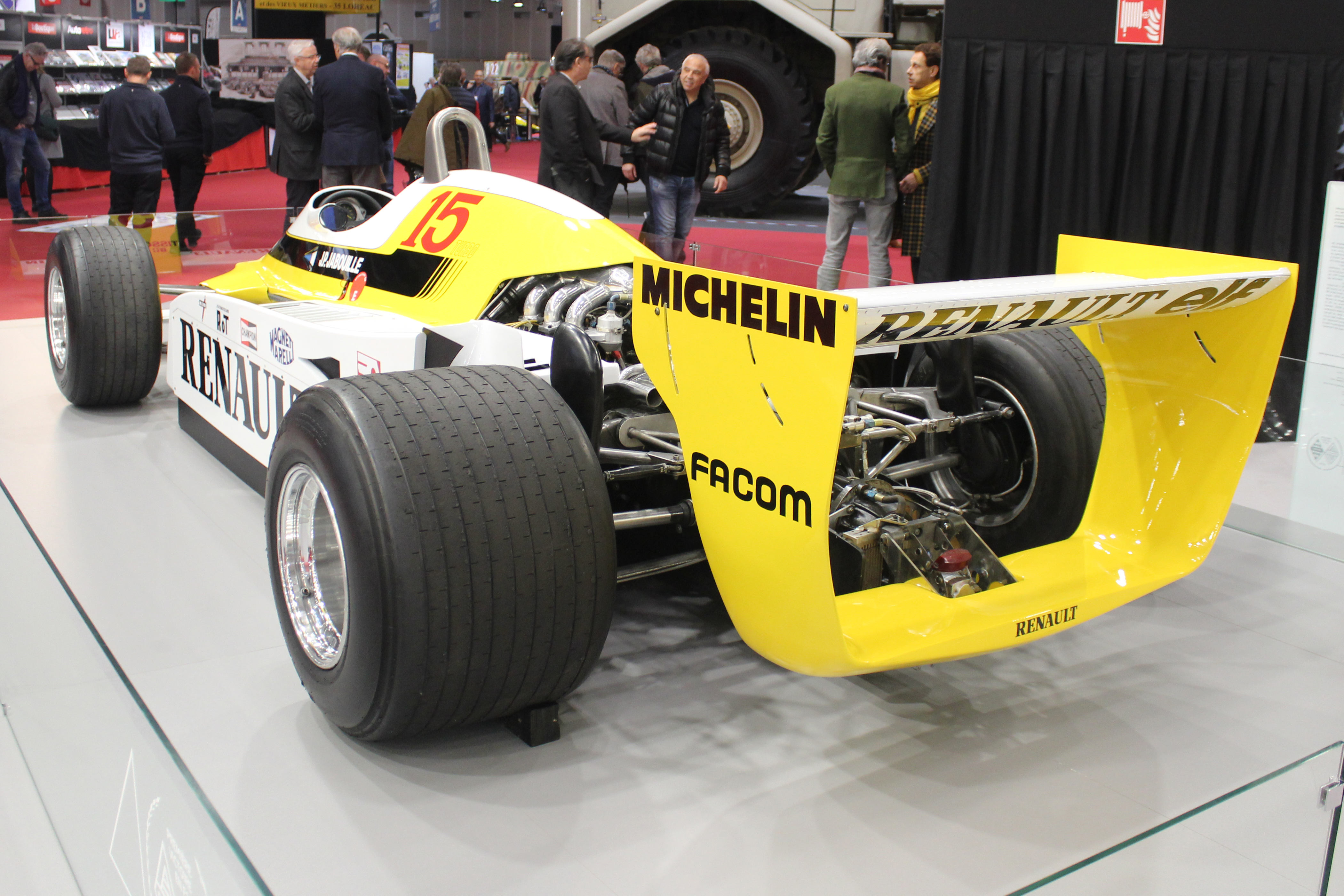 Exposition Renault Turbo à Rétromobile 2019